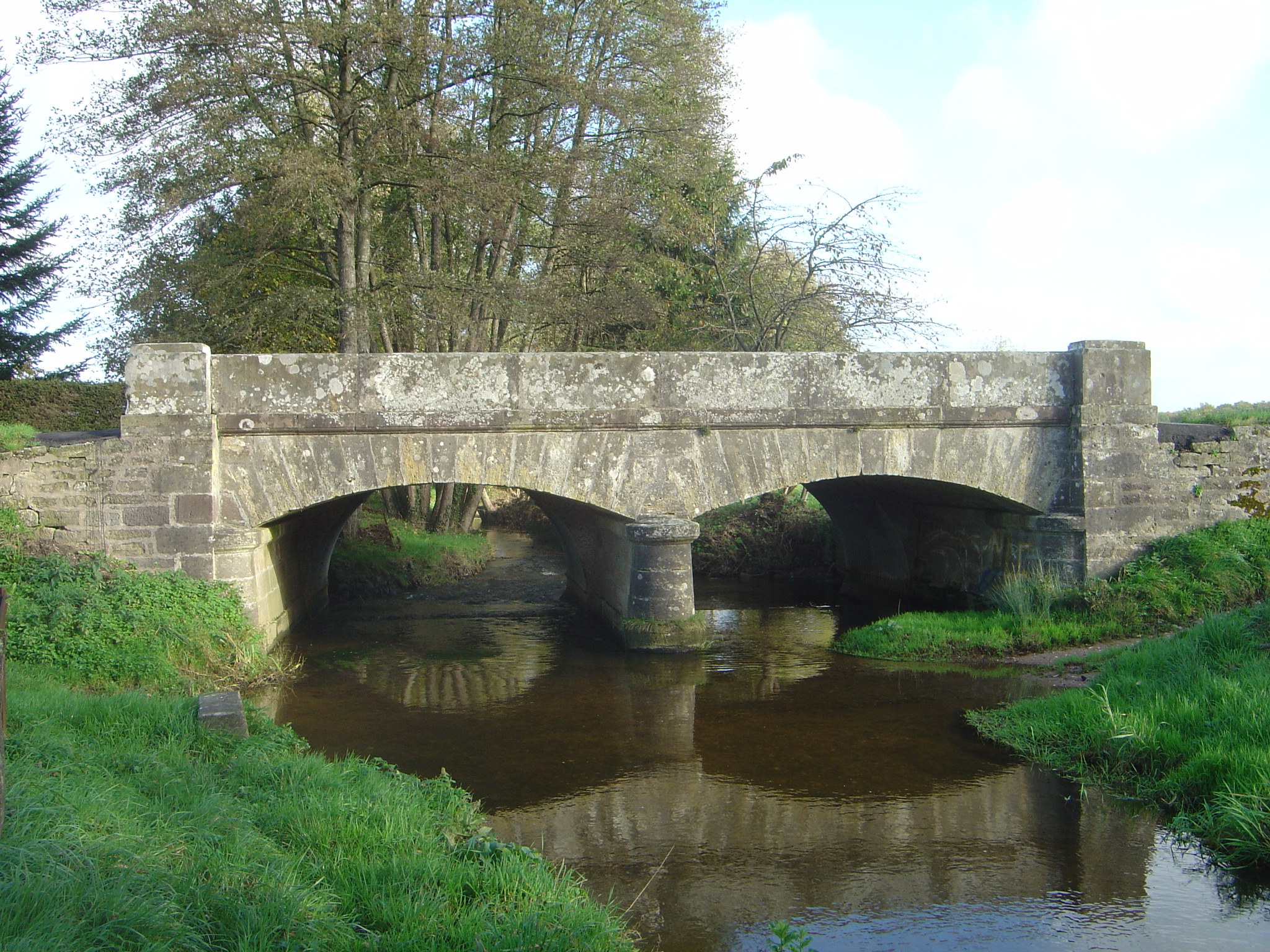 Bridge in Pierrepont-sur-l'Arentèle.